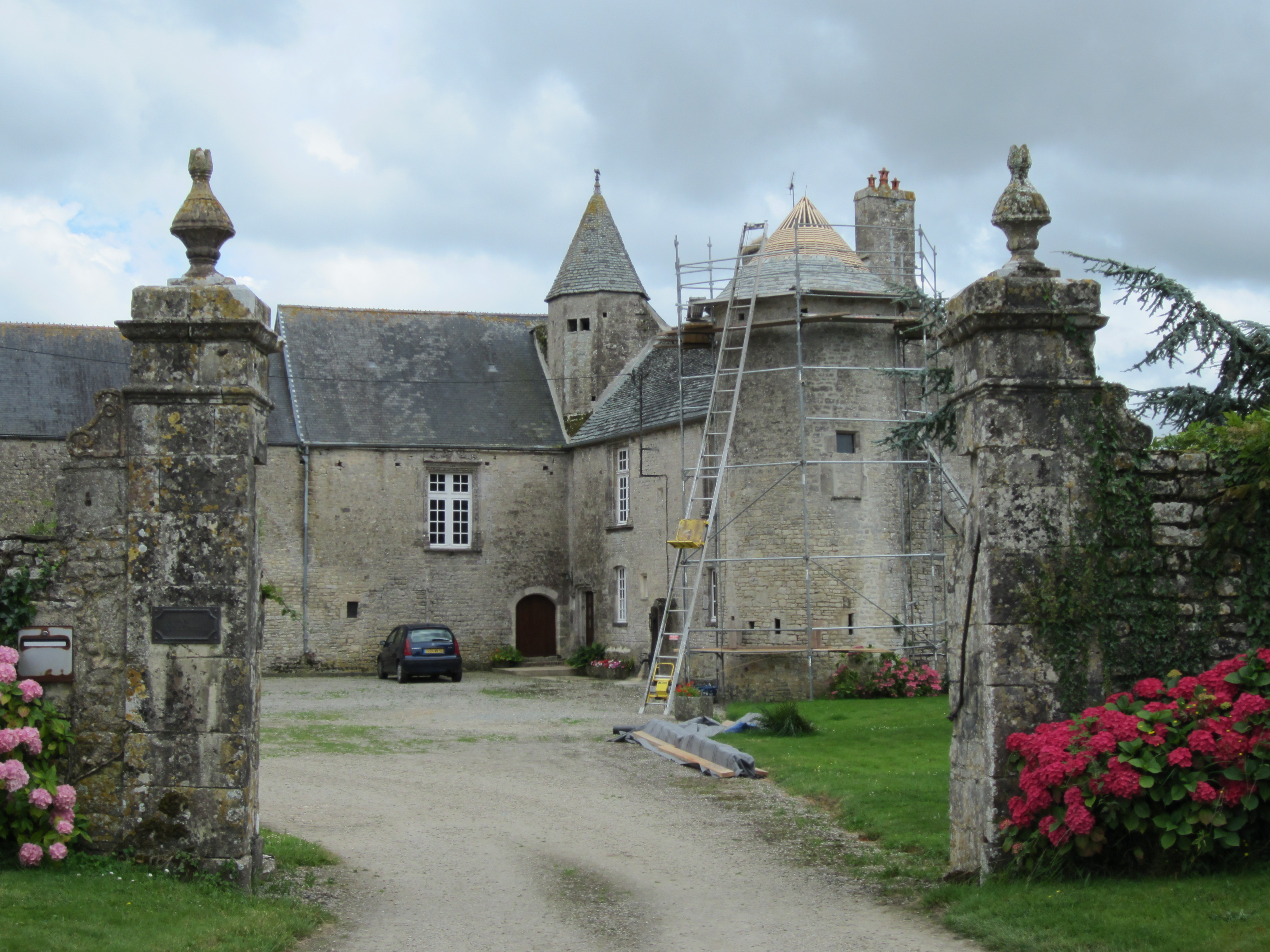 Ferme du Breuil, manoir du 16ème siècle Colomby